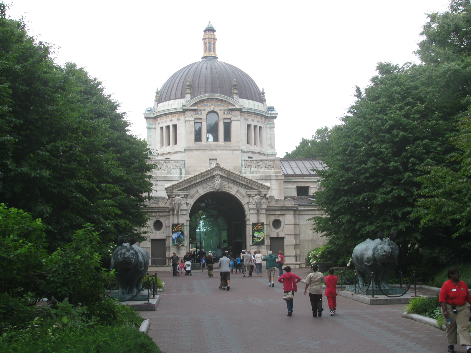 Zoo Center